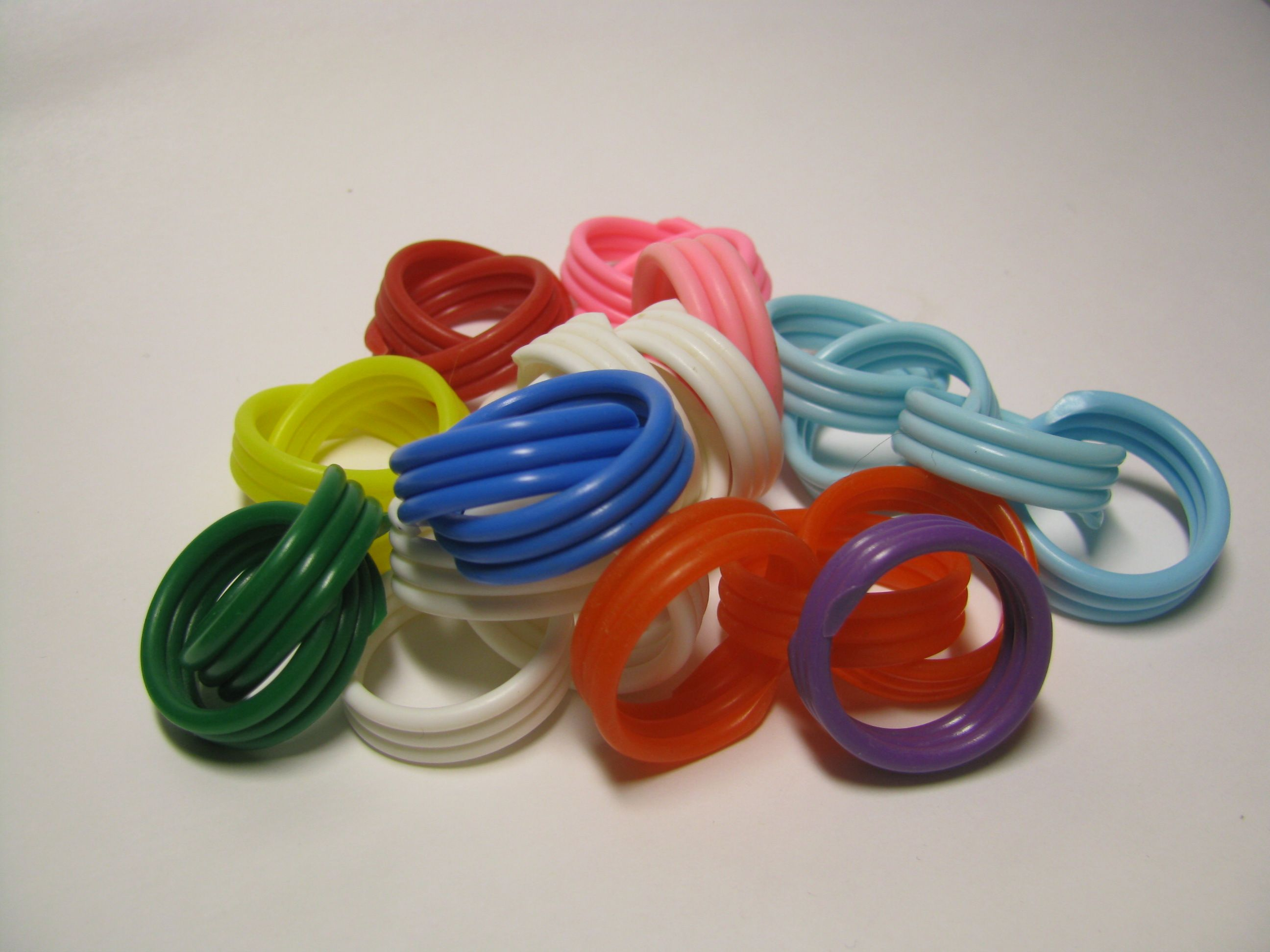 Markierungsringe, Spiralringe, Schlüsselringe